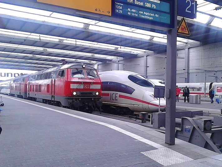 EC 193 in München Hbf mit DB-Baureihe 218 Doppelgarnitur